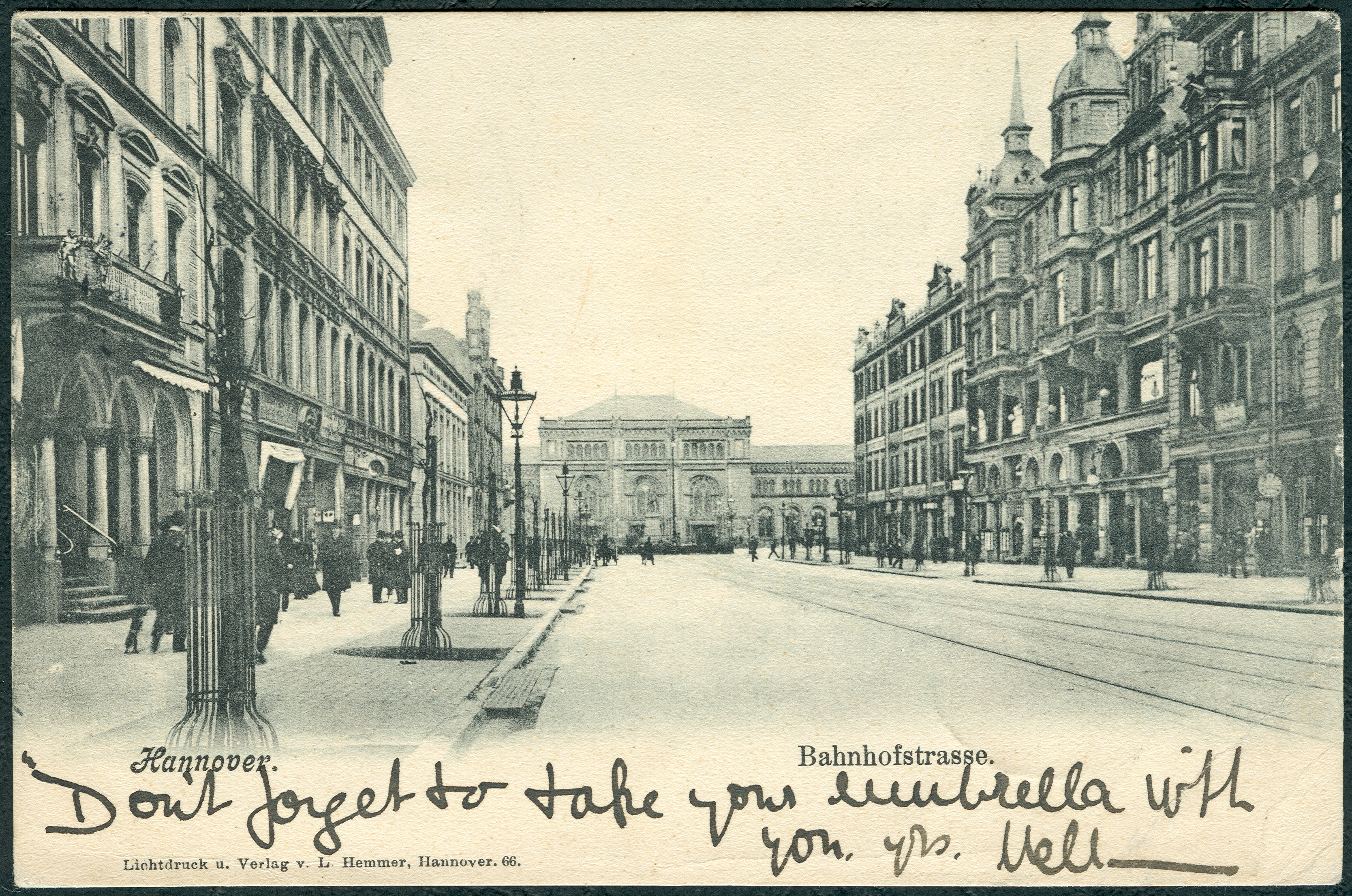 Ansichtskarte Nummer 66 von Ludwig Hemmer. Der Blick durch die Bahnhofstraße in Richtung Hauptbahnhof überrascht hier wohl weniger mit den unversehrten Fassaden der großstädtischen Kaufhäuser und Gebäude, als vielmehr durch das beinahe völlige Fehlen von Fahrzeugen in der Straße, wo heute die Niki-de-Saint-Phalle-Promenade verläuft.